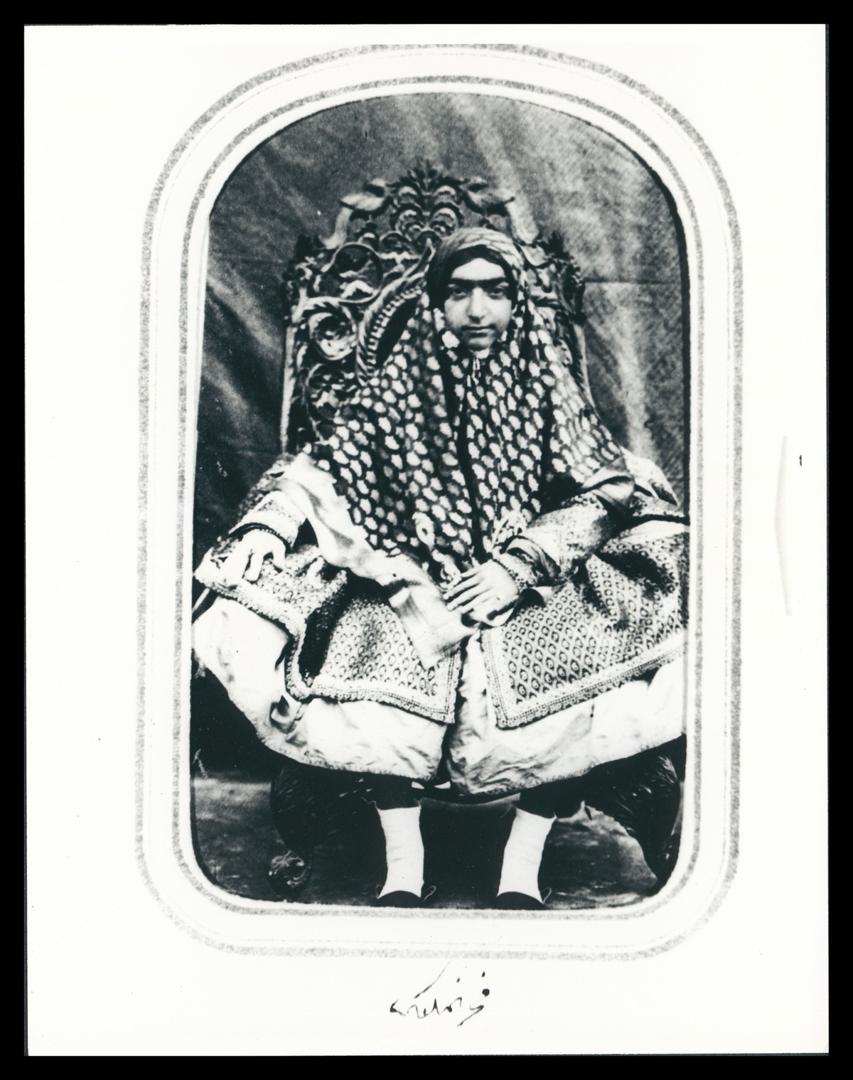 فخرالملوک دختر ناصرالدین شاه